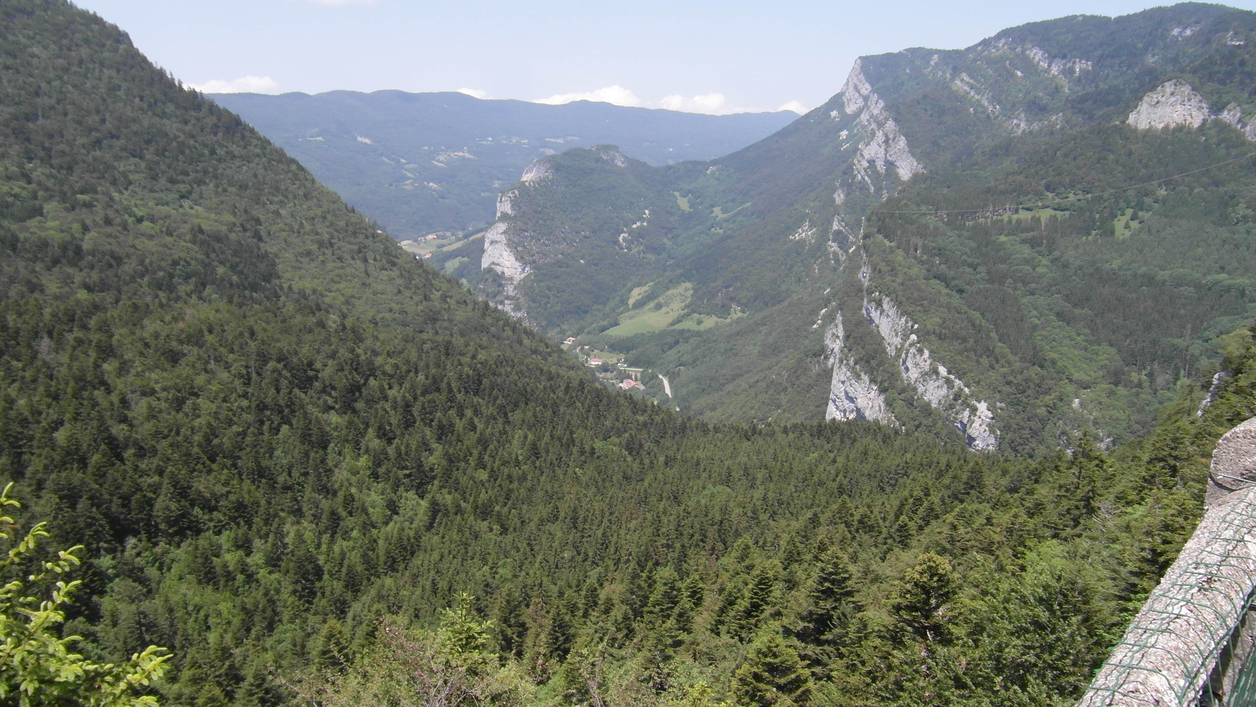 Foret de Villard Valchevrière